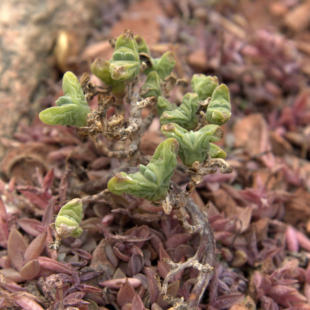 Drosanthemum vaginatum